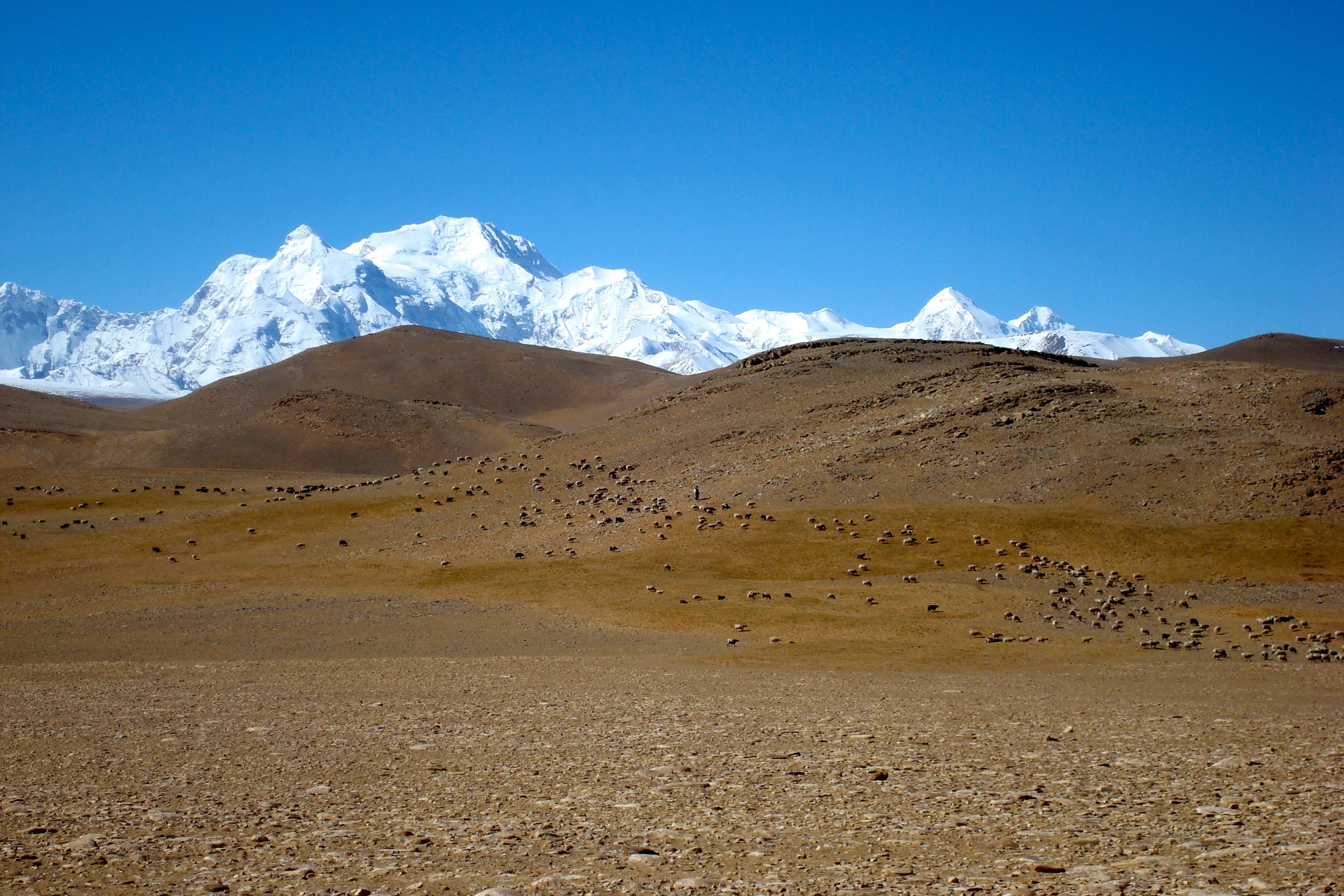 Shishapangma (halblinks) und Porong Ri (rechts)